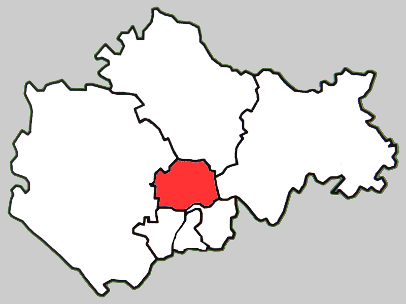 蚌埠市淮上区地图